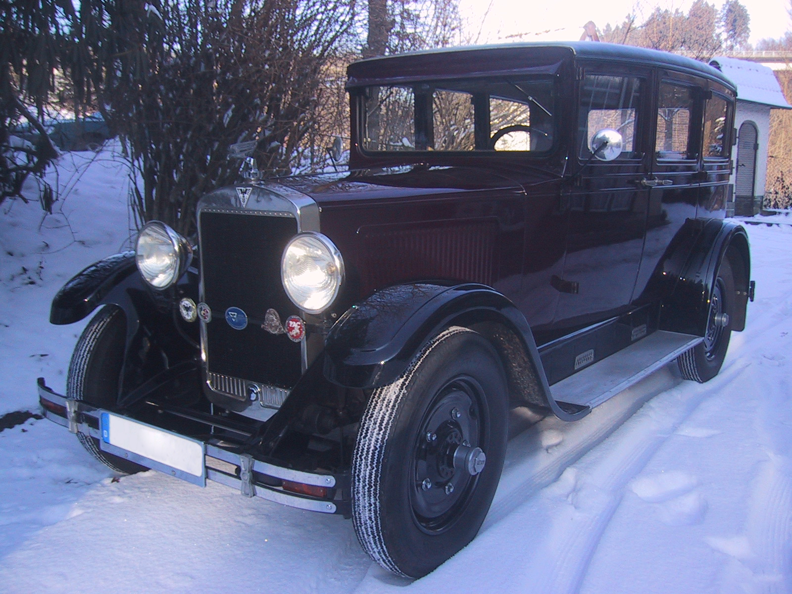 Adler Favorit 8J von 1930